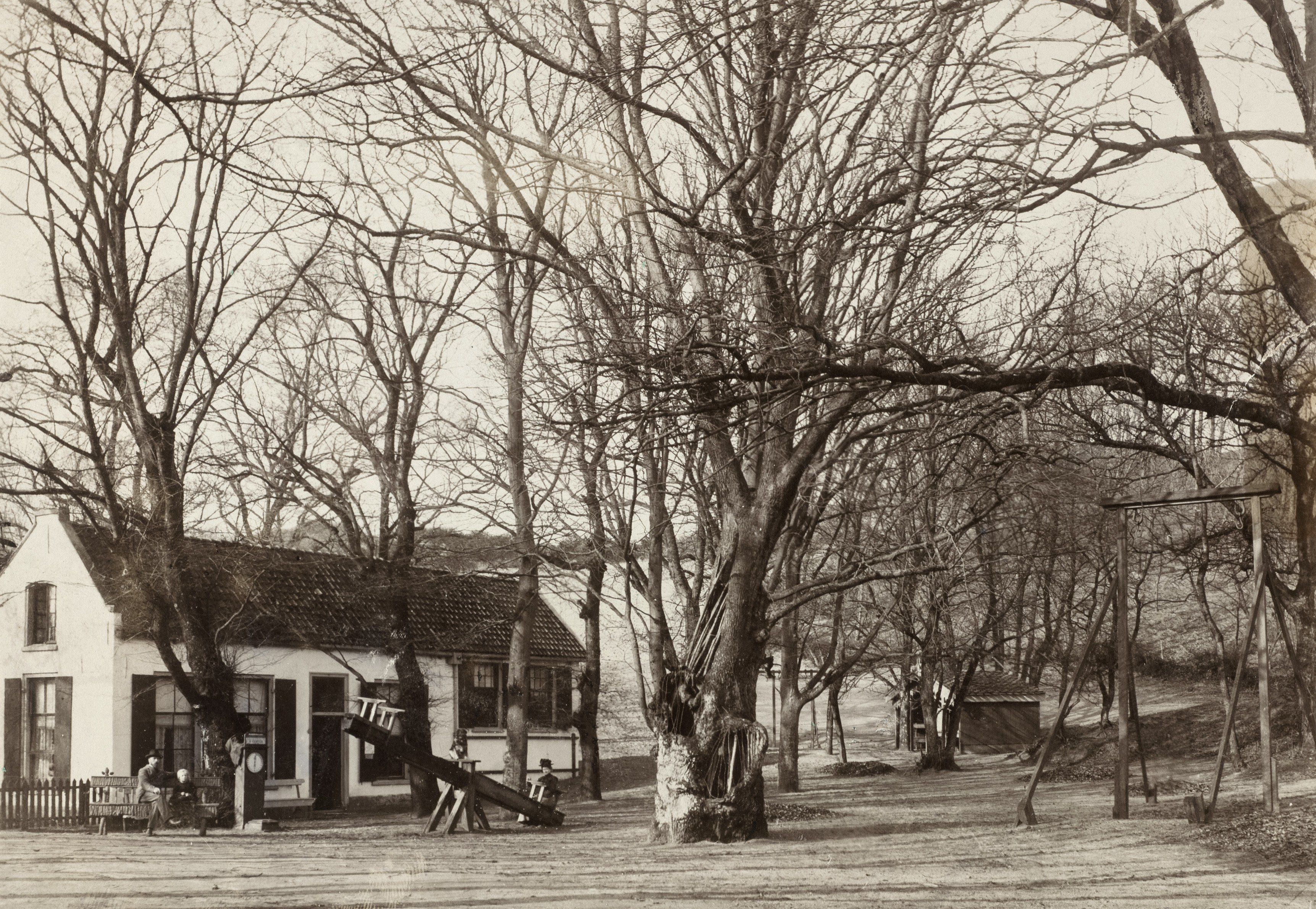 Uitspanning "Kraantje Lek" met holle boom, hoek Rockaertsduinweg, ziende naar het westen.